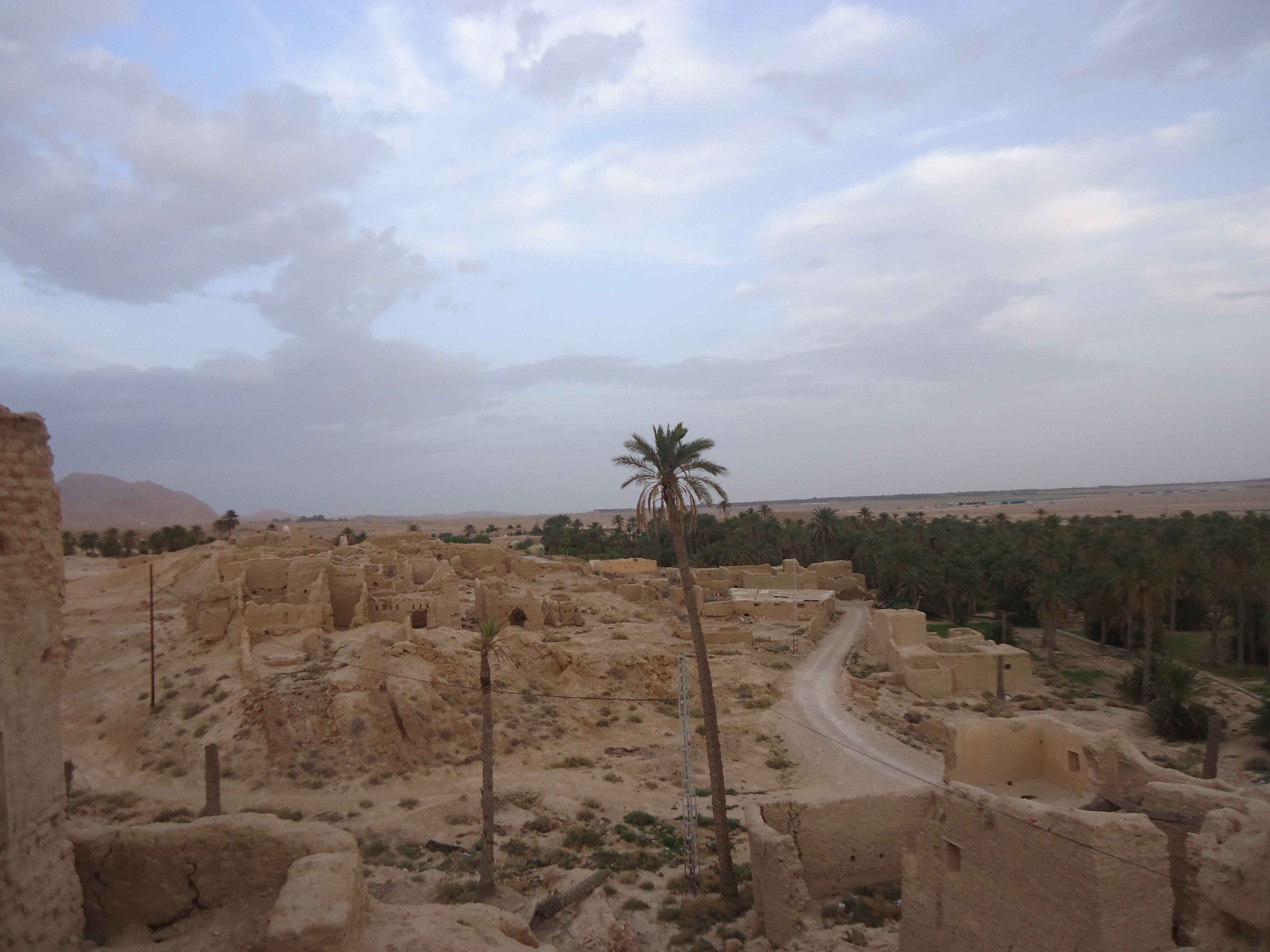 صورة عامة لمنطقة سيدي خليل قديما